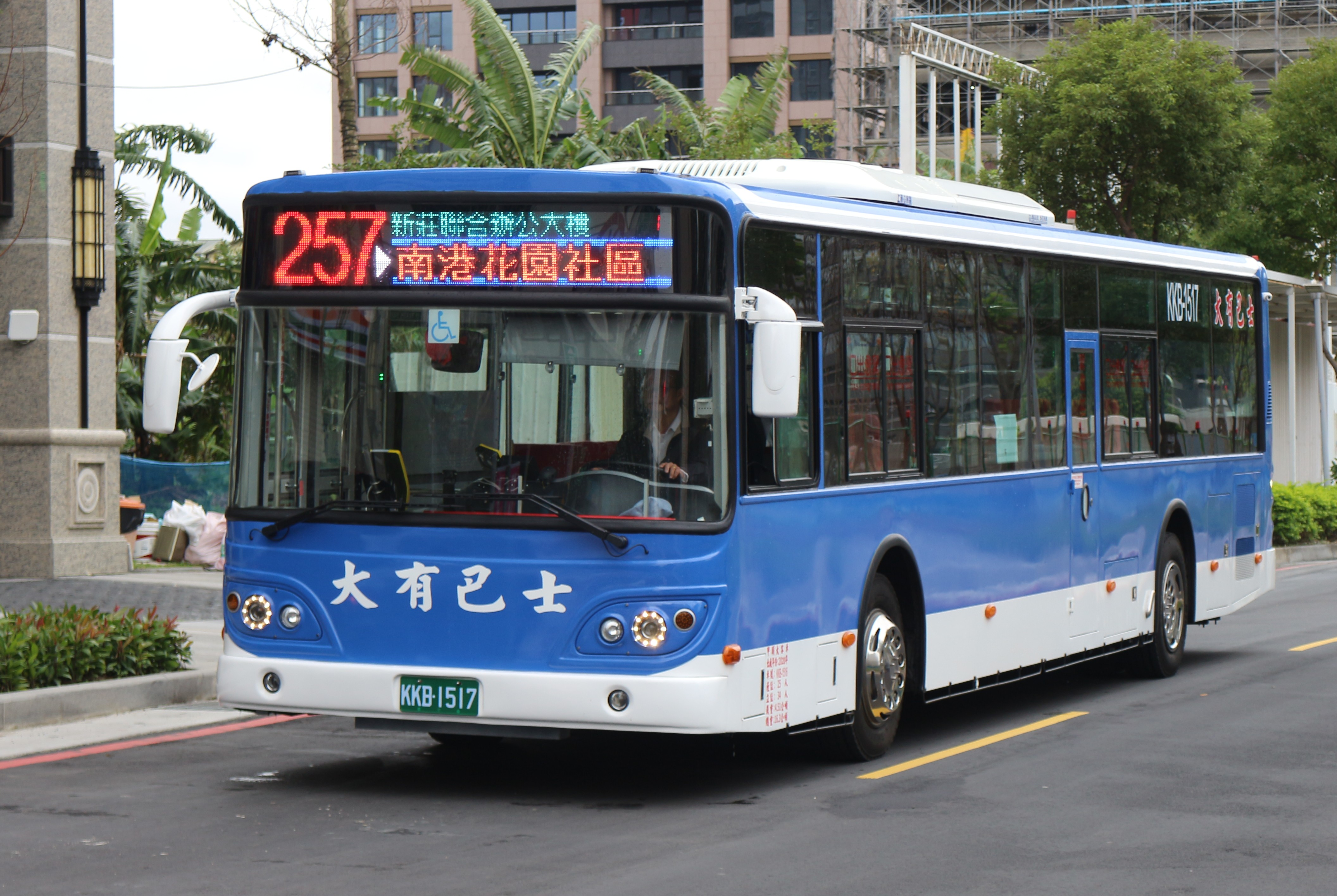 大有巴士 2020 成運 Master MB120NS KKB-1517 257